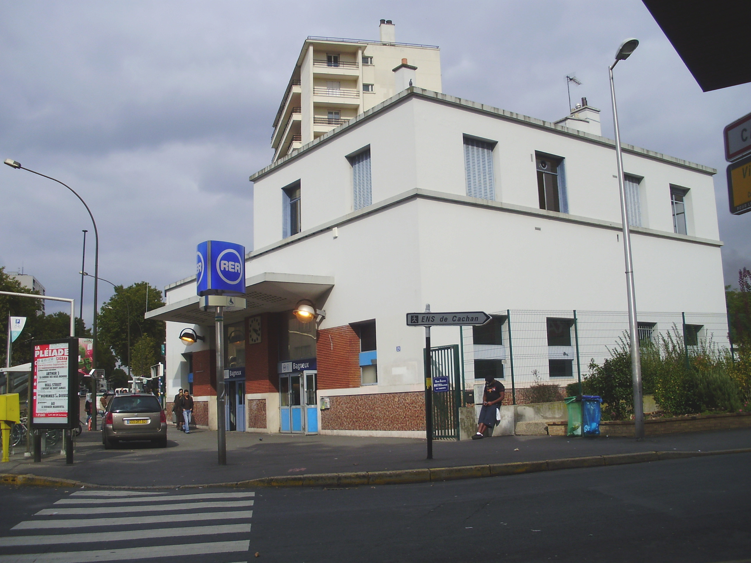 Gare de Bagneux, à Cachan, Val-de-Marne, France (entrée du bâtiment voyageurs)